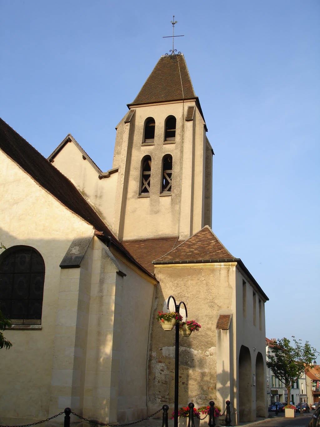 L'église Saint-Martin de Groslay (Val-d'Oise), France